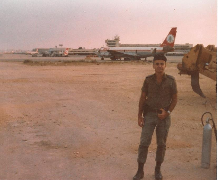 תא"ל גדעון רז בשדה התעופה בבירות במסגרת הפקת לקחי לחימה במלחמת לבנון